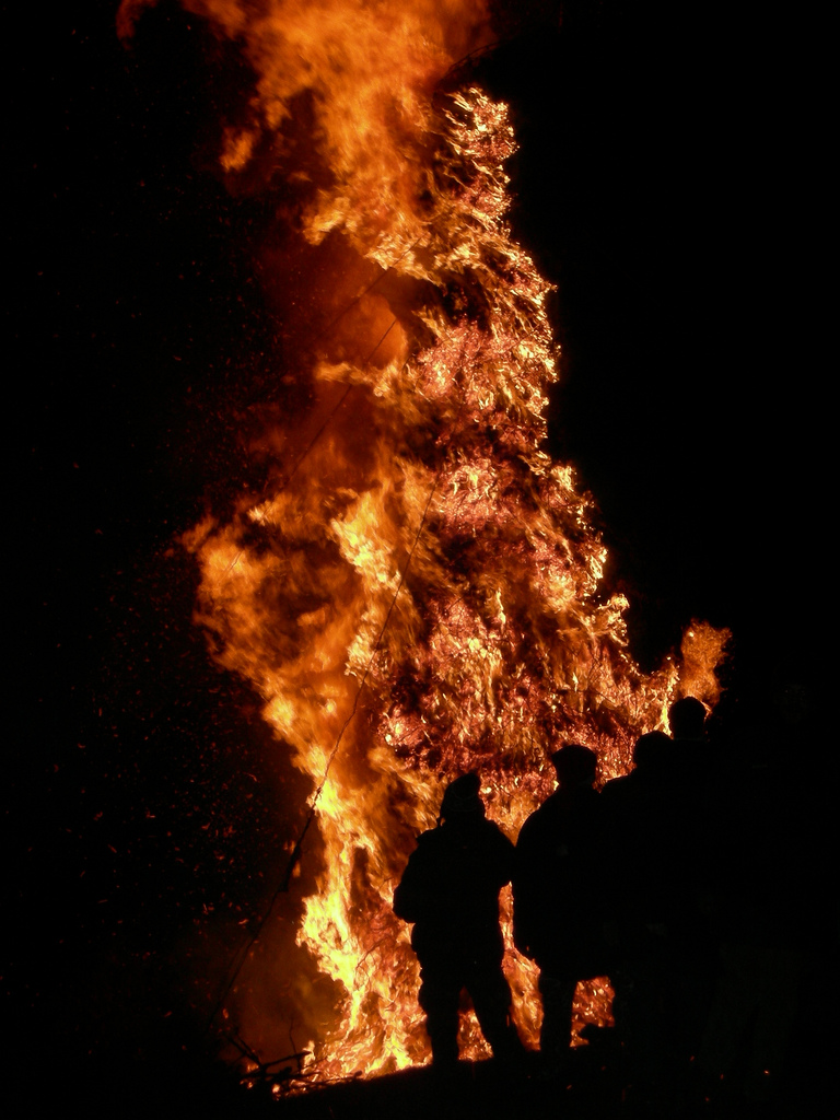 Daniele Romei Falò Santo Natale 2007 Verrucolette Minucciano (Lucca)